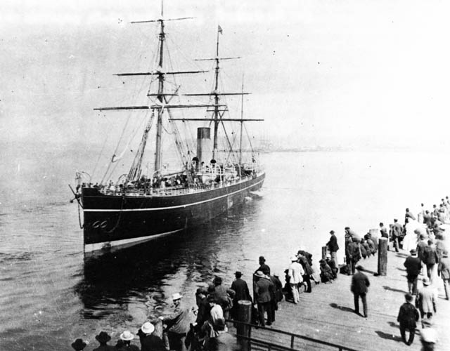 SS Abysinnia chega ao porto de Vancouver vindo de Hong Kong e Yokohama em 14 de junho de 1887